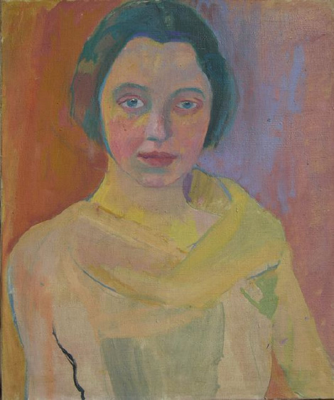 Ilse Heller-Lazard Porträt Maja Klauser 54.5 x 46 cm Werkkatalog Nr.136